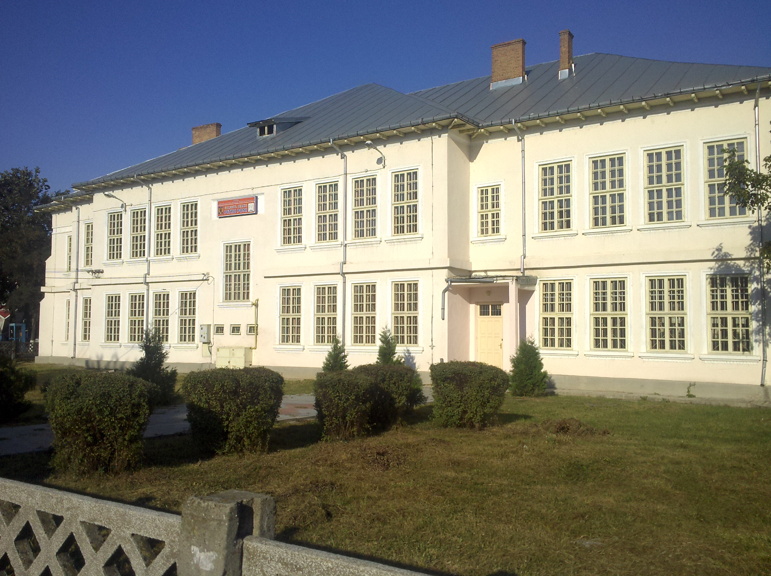 şcoala nr 3 Roman